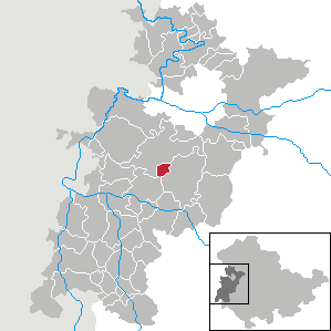 Ettenhausen a.d. Suhl in Thuringia - Wartburgkreis